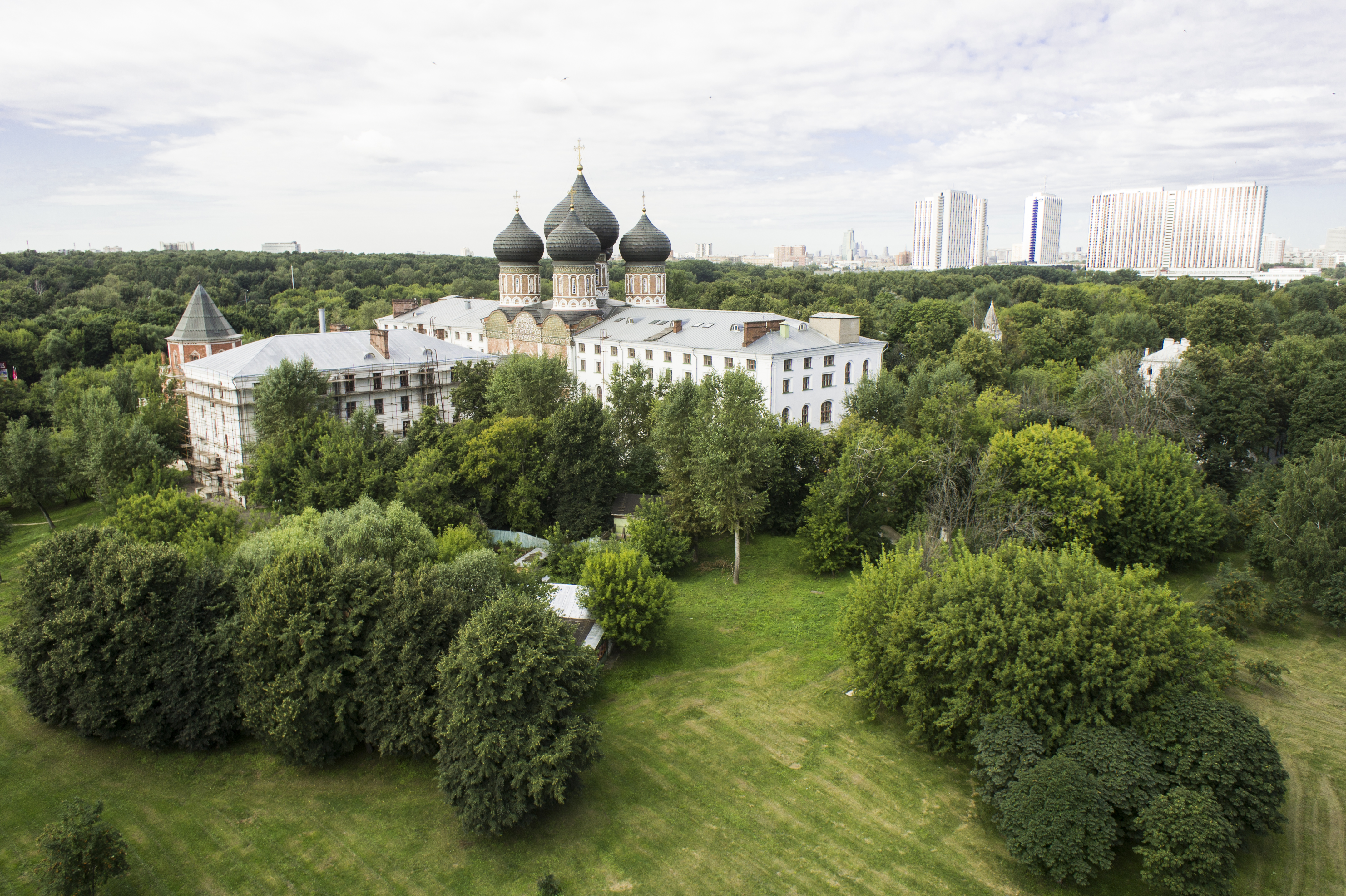 Общий вид с берега